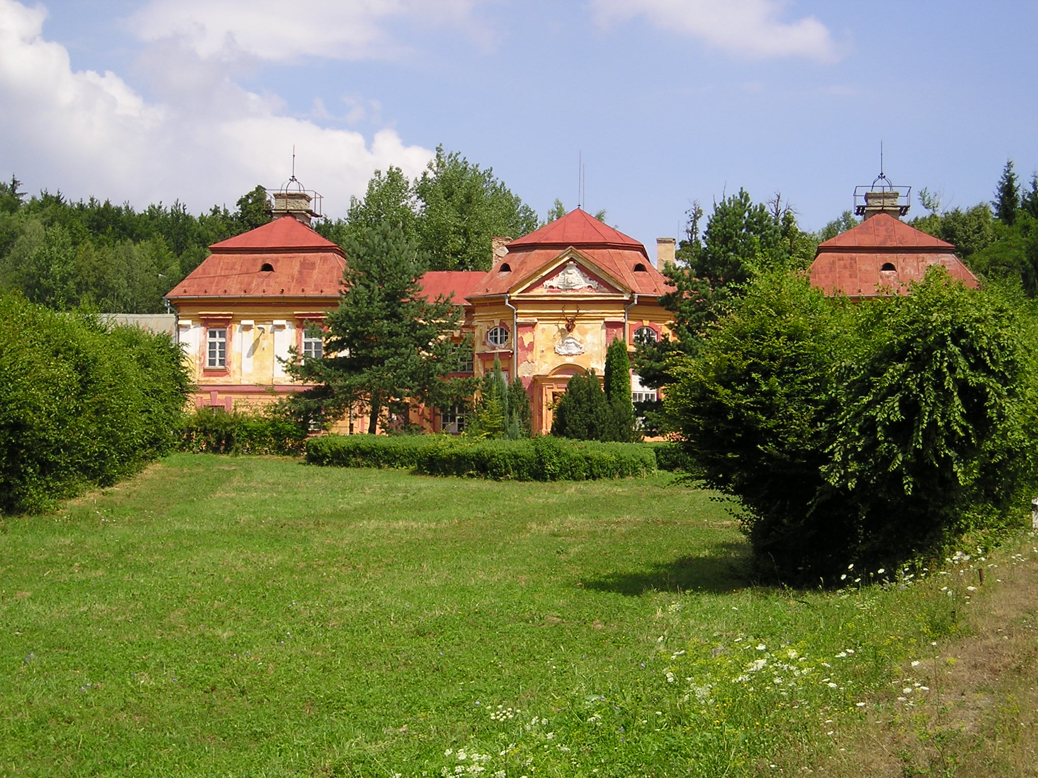 Zámek Ferdinandsko